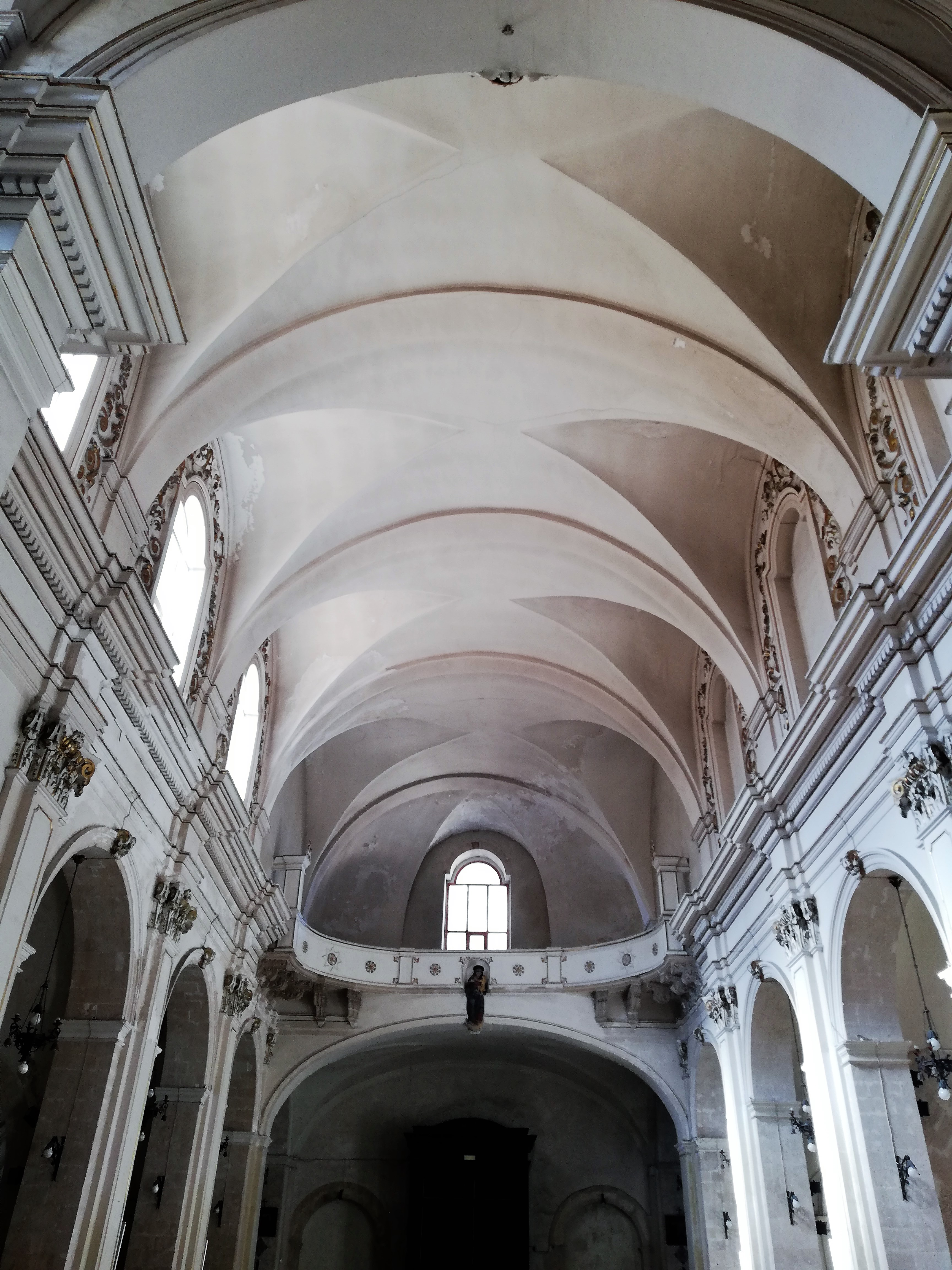 Volta navata.